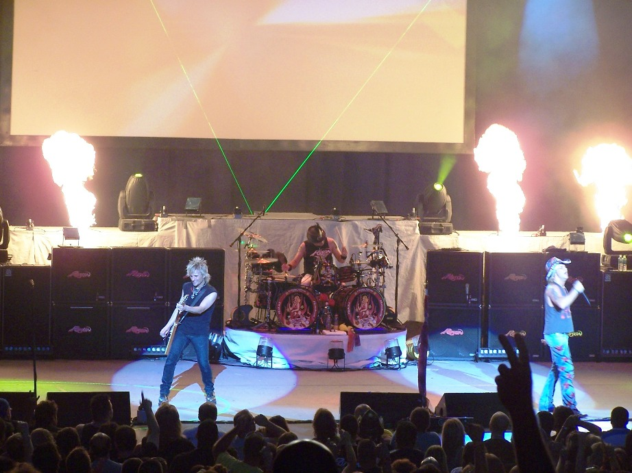 Poison image